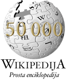 Pripravljen logotip za 50000 člankov. Pripravil: Miha v programu Xaralx.